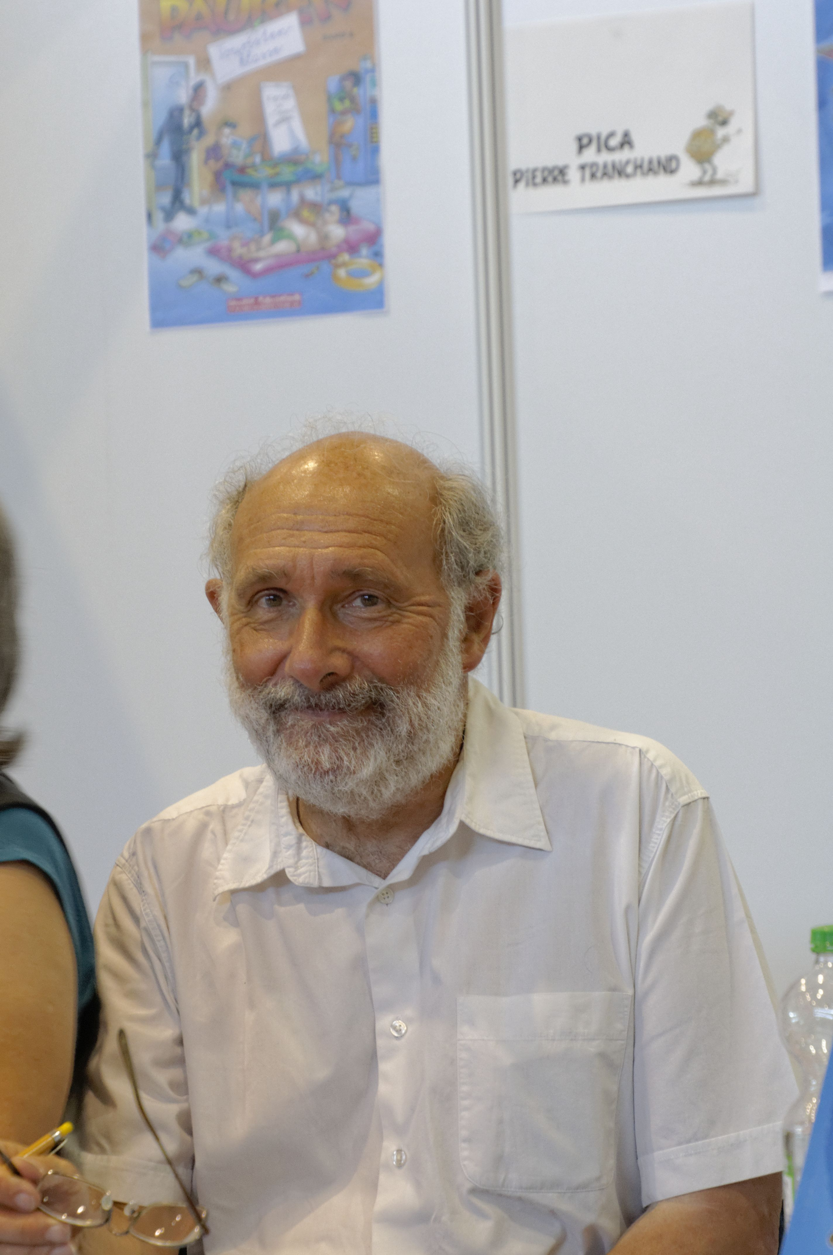 Bilder von der Comic Con Germany 2019 in Stuttgart